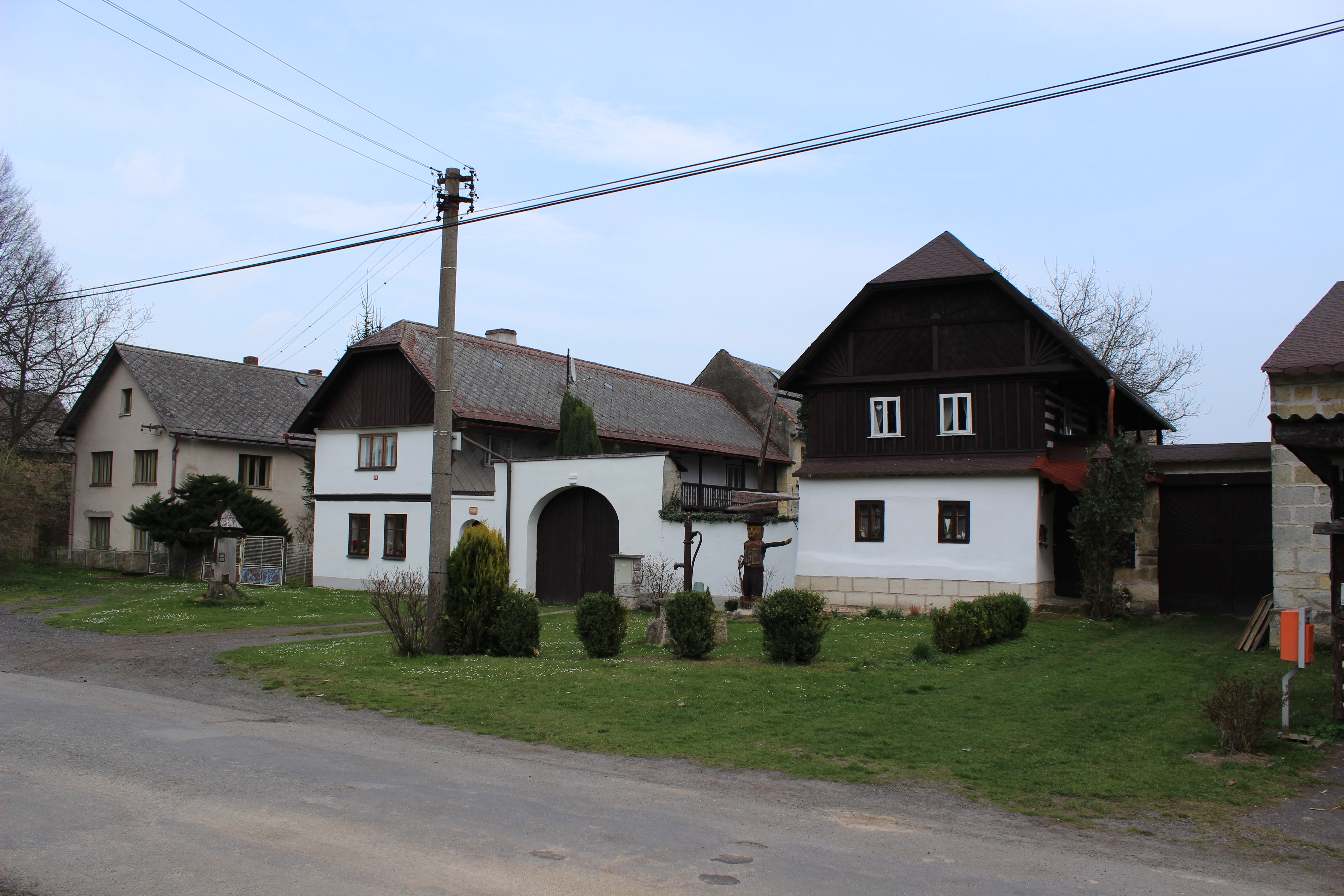 Statek s bránou číslo popisné 24 v Trnové, části Katusic. This photograph was taken with a Canon EOS 600D.